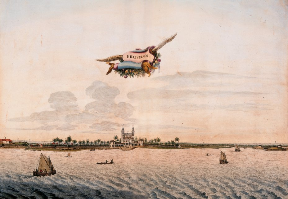 'FRIBVRGVM', gravura que ilustra o livro de Barlaeus (BARLAEUS - 1647), estampa nº 38. Exemplar pertencente à Biblioteca Nacional, Rio de Janeiro. No centro da gravura observa-se o Palácio de Friburgo, local de residência e de despachos de Maurício de Nassau situado na capital do Brasil Holandês, Recife. Pelos elementos que apresenta, data provavelmente de 1643.